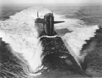 U.S. Navy